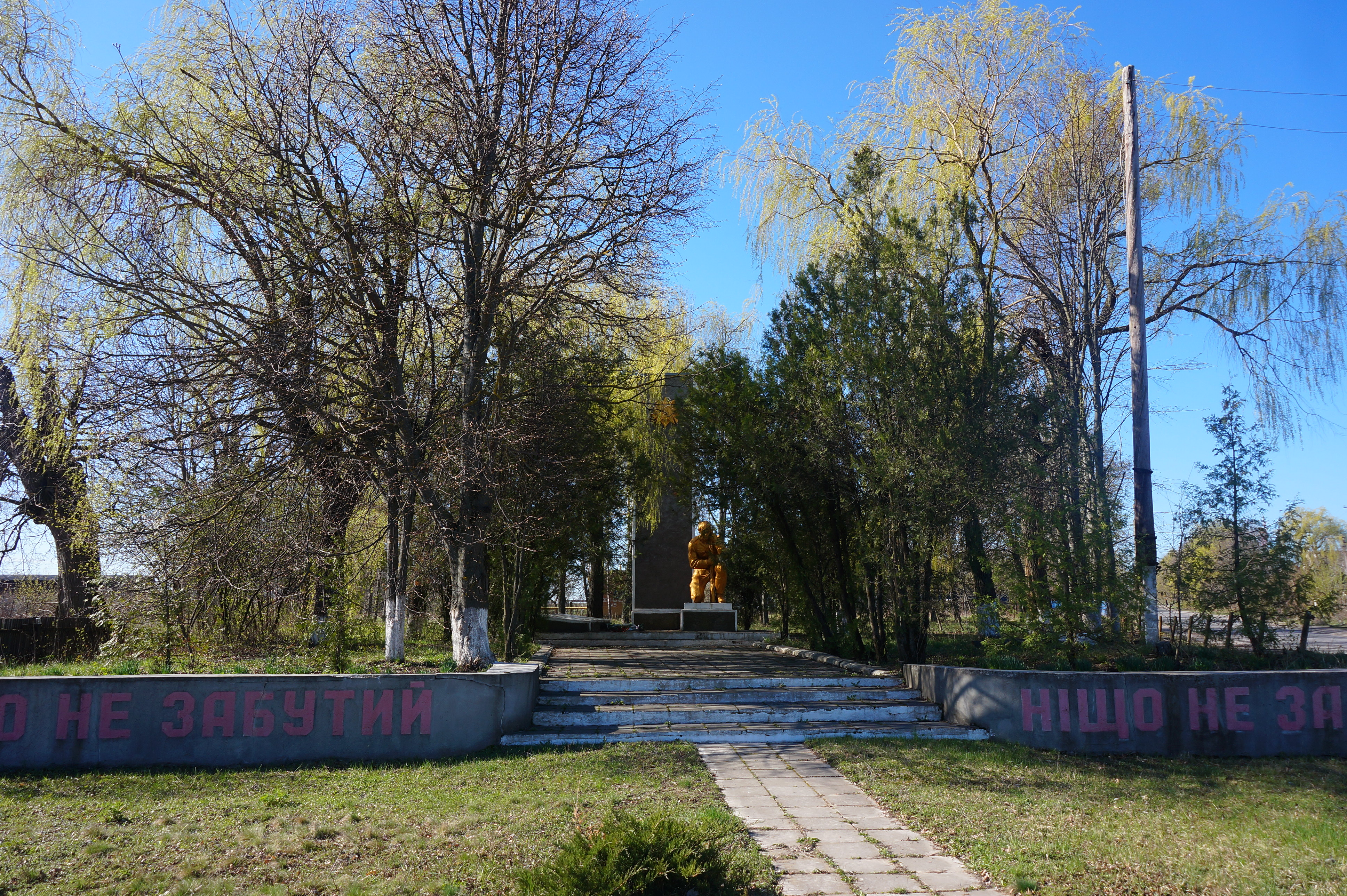 Пам’ятник 326 воїнам –односельчанам, загиблим на фронтах ВВВ, Леляки, вул. Леніна